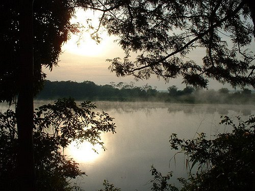 Margem do Rio Ivinhema